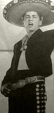 AGUSTIN DE ANDA ACTOR